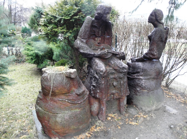 autor: JNina Mirecka - polska artystka, rzeźbiarka